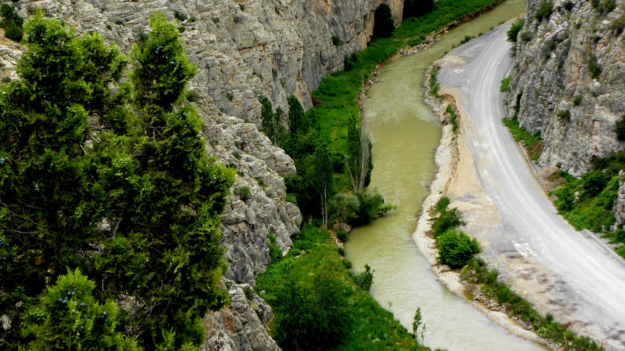 Avdan rampasından mavi boğaz